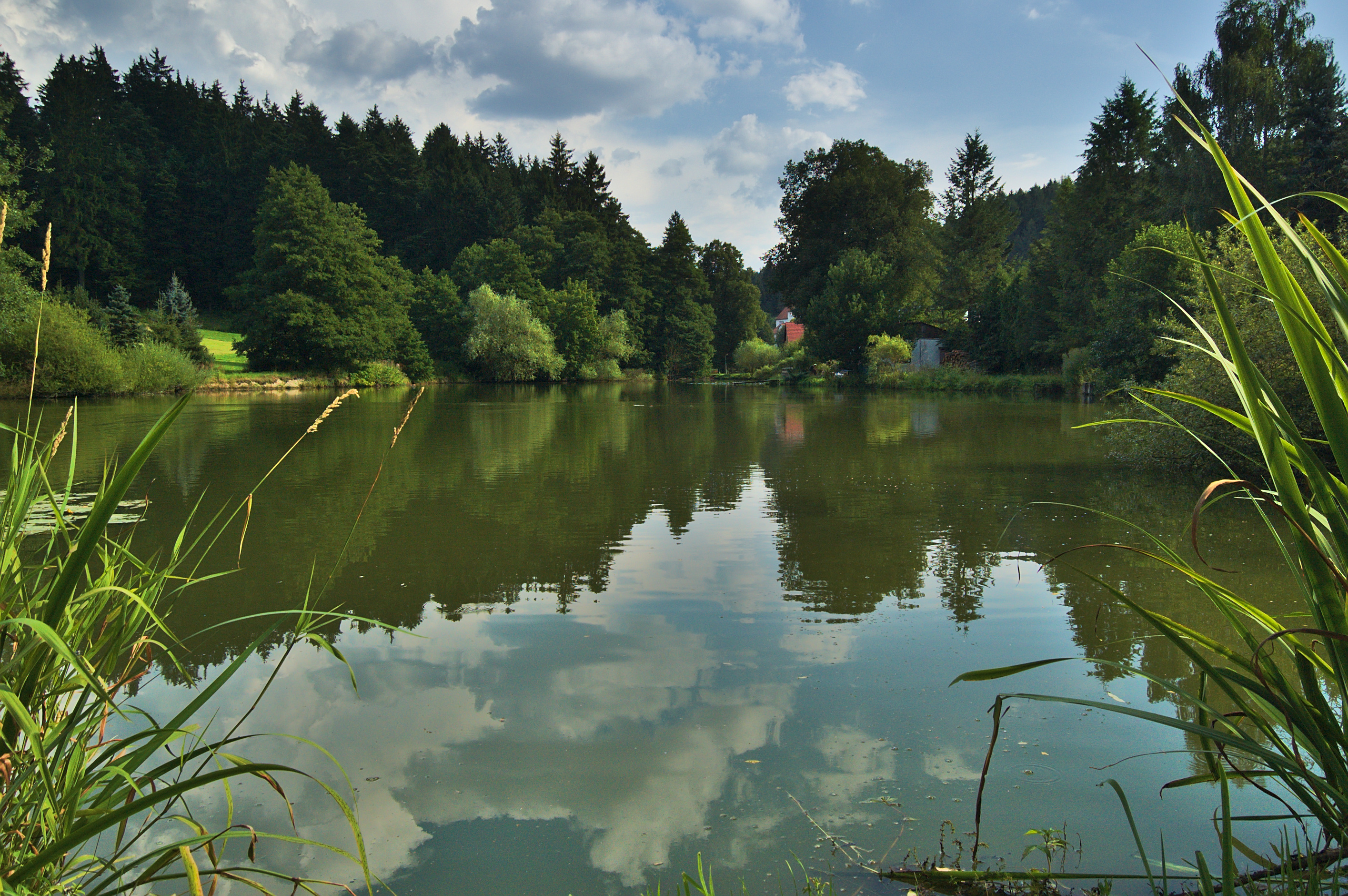 Rybník na návsi, Baldovec, Rozstání, okres Prostějov